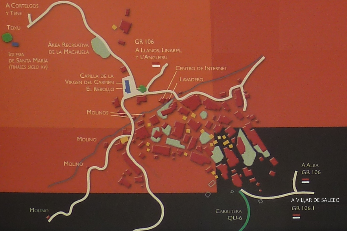 Mapa esquemáticu del llugar de Bermiego (Quirós).